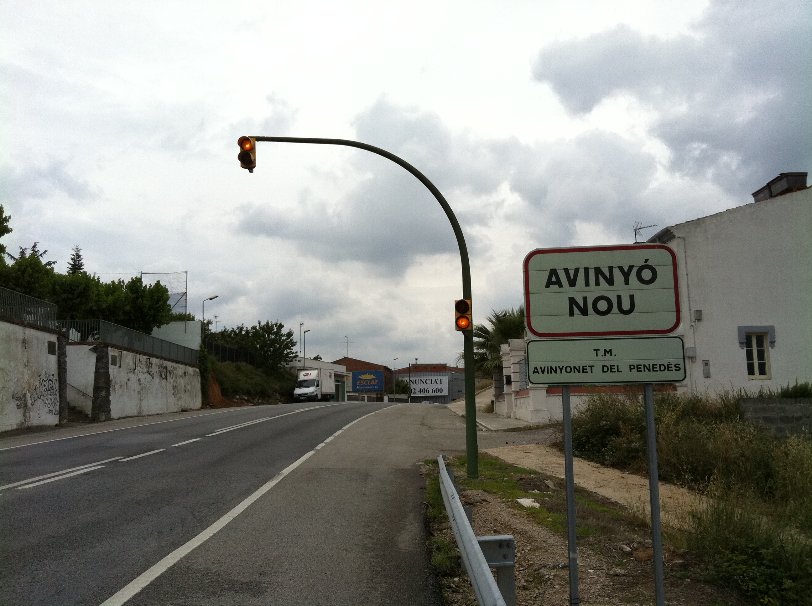 Avinyó nou